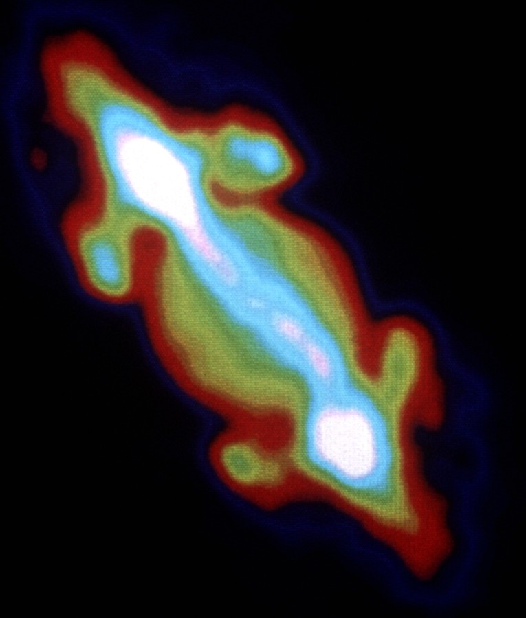 Jupiter Radio Image with Radiation belts на викисклад